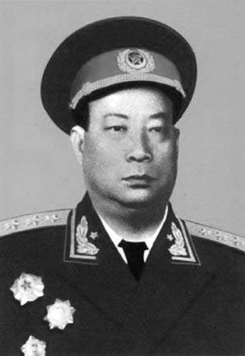 贺炳炎将军1955年受勋照